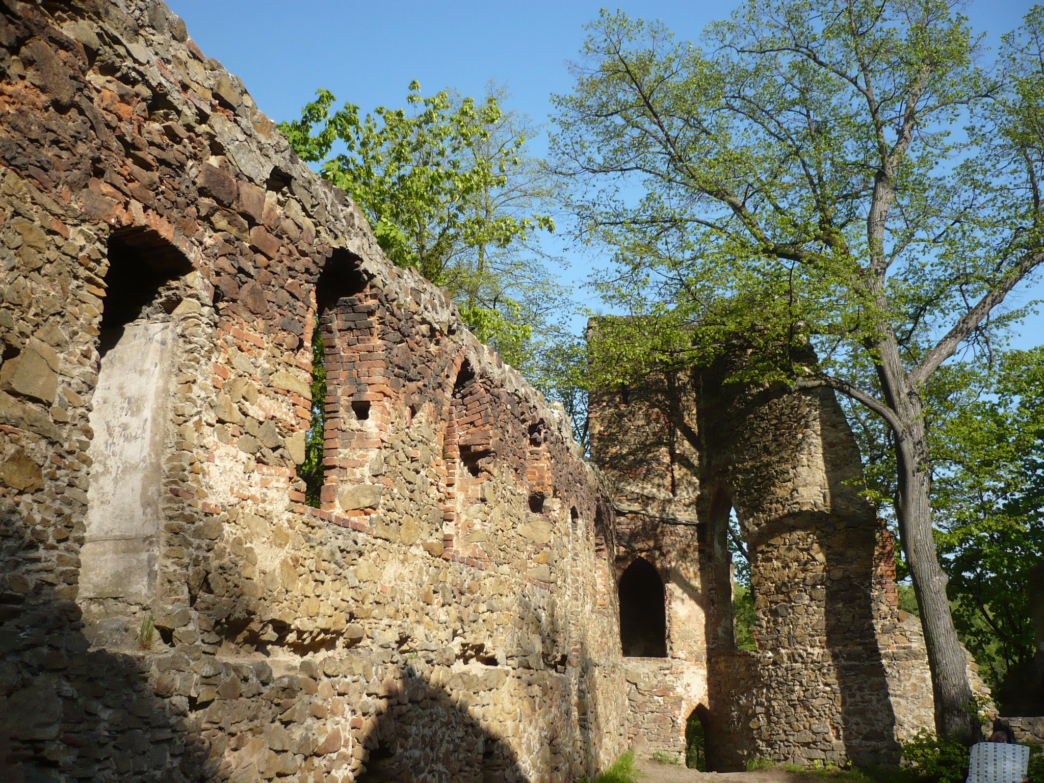 Stary Książ